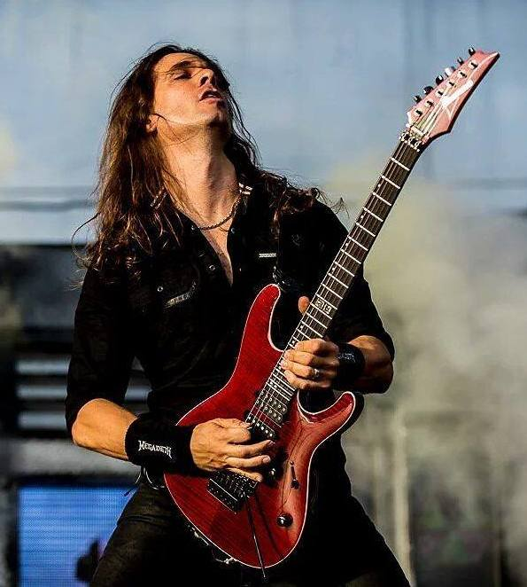 Kiko Loureiro, em Fort Rock, DystopiaTour 2016